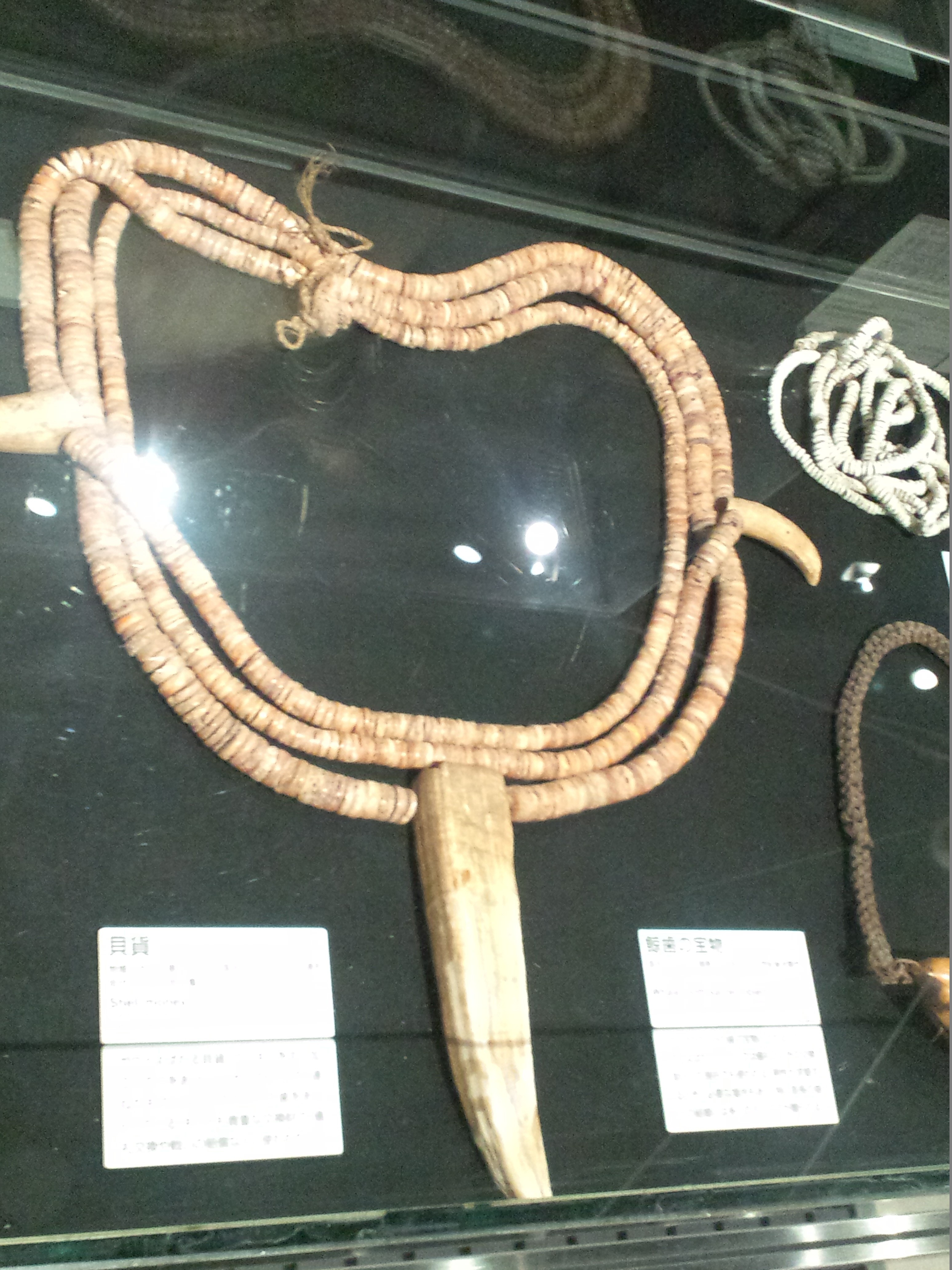 国立民族学博物館（大阪） 貝貨（ミクロネシア連邦、ヤップ島、1977年収集）